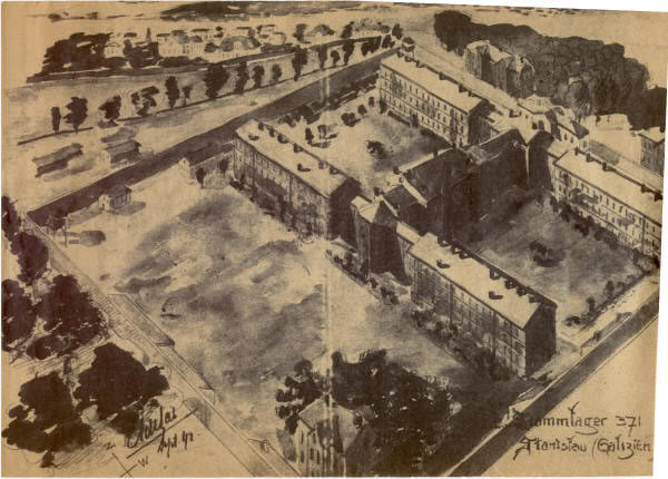 квітень 1942 р.